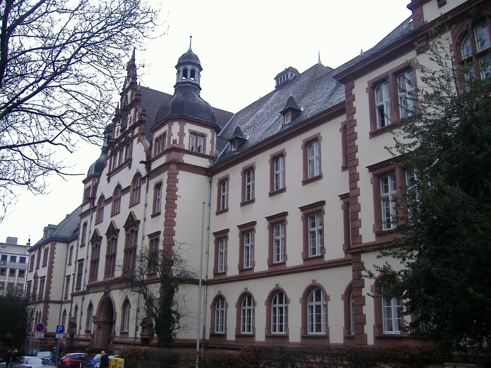 Altes Gerichtsgebäude Wiesbaden